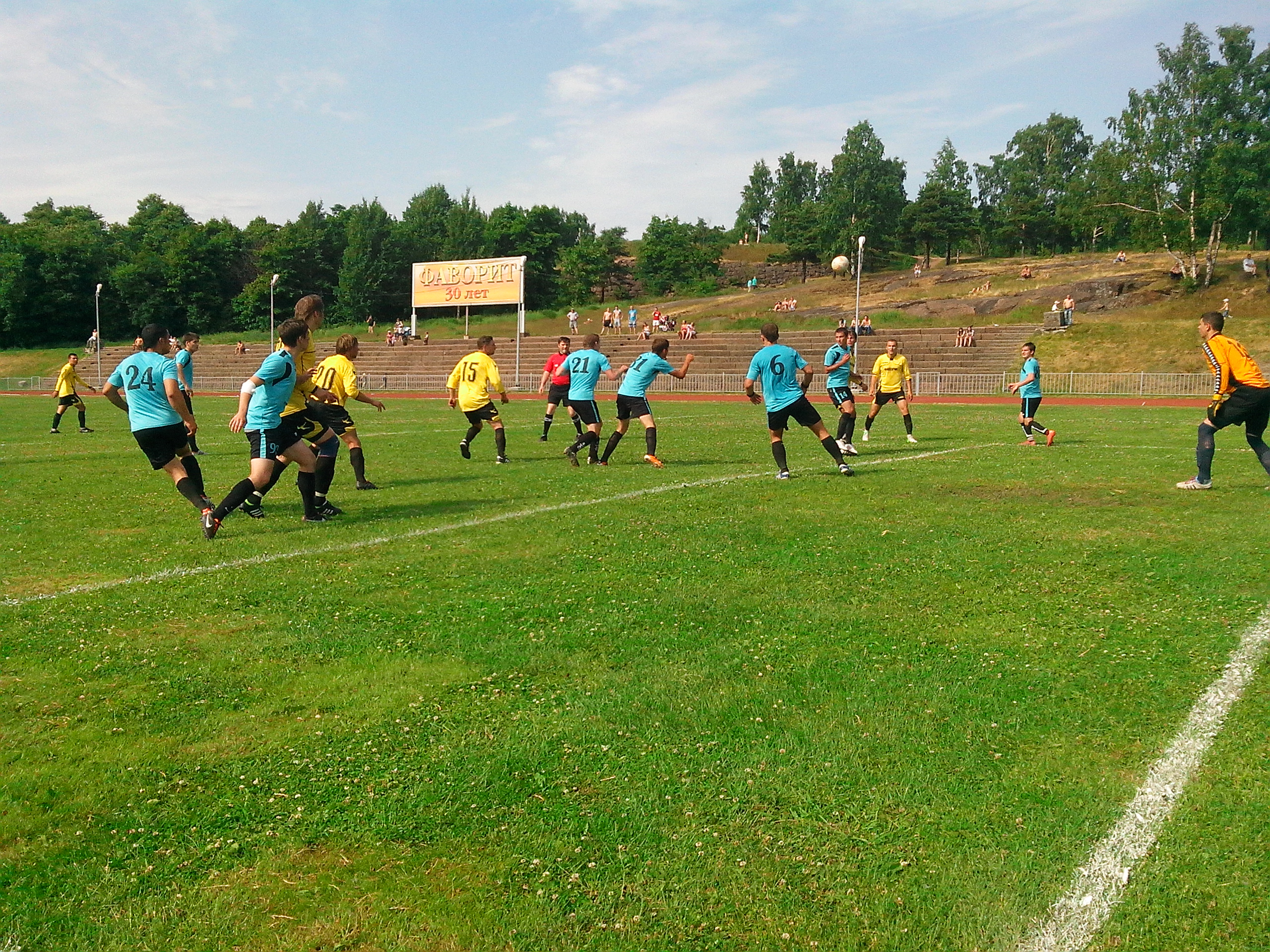 Футбольный клуб Фаворит